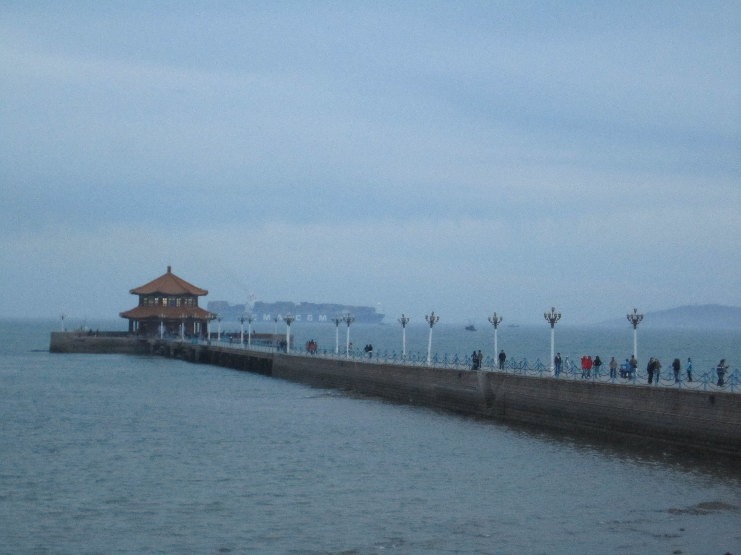 棧橋及洄瀾閣中文（中国大陆）: 栈桥及回澜阁